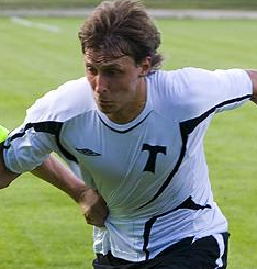 Vladimir Voskoboinikov, Estonian footballer.